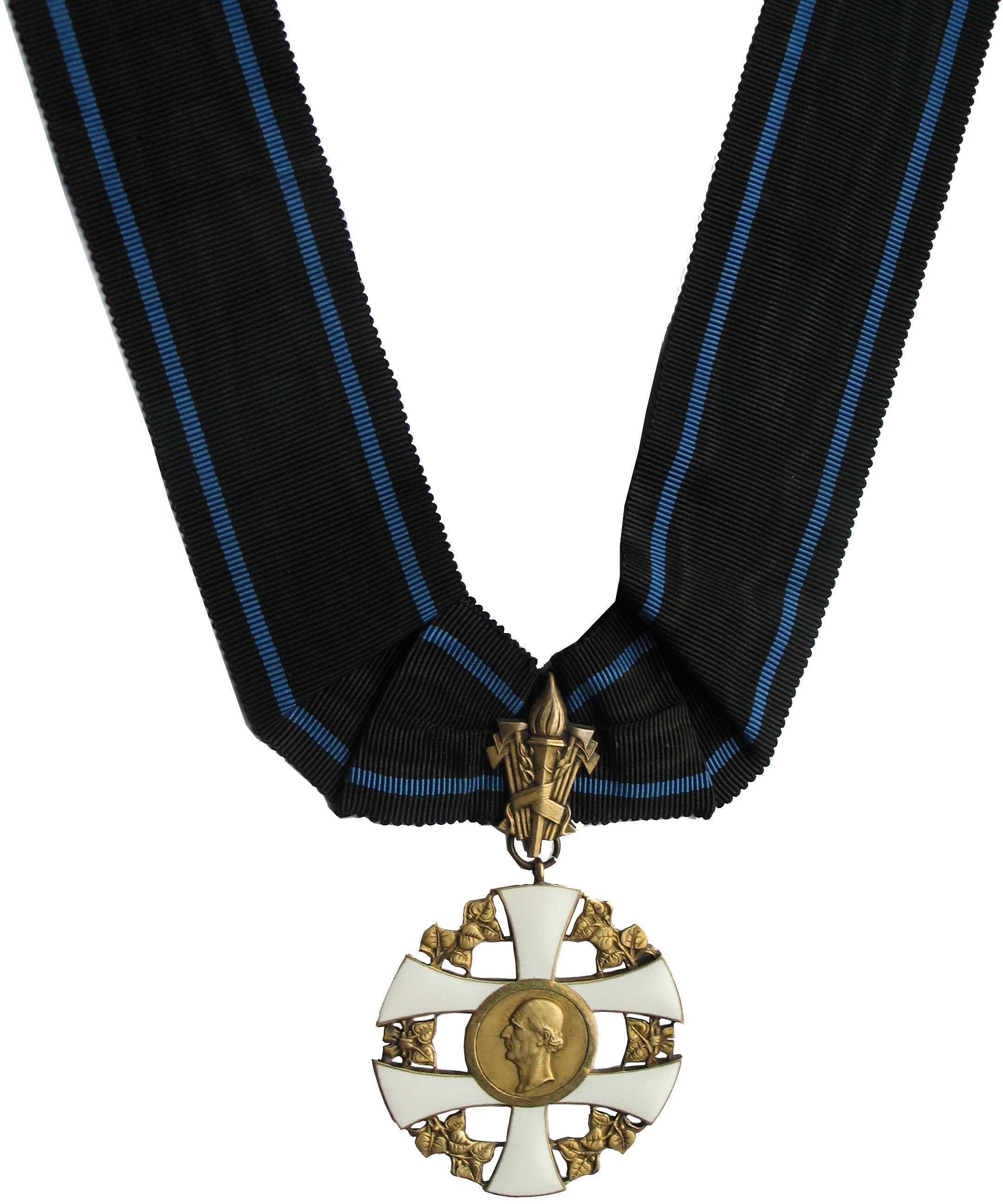 Autorom Veliteľského kríža Radu Slovenskeho kríža z roku 1940 je Fraňo Štefunko